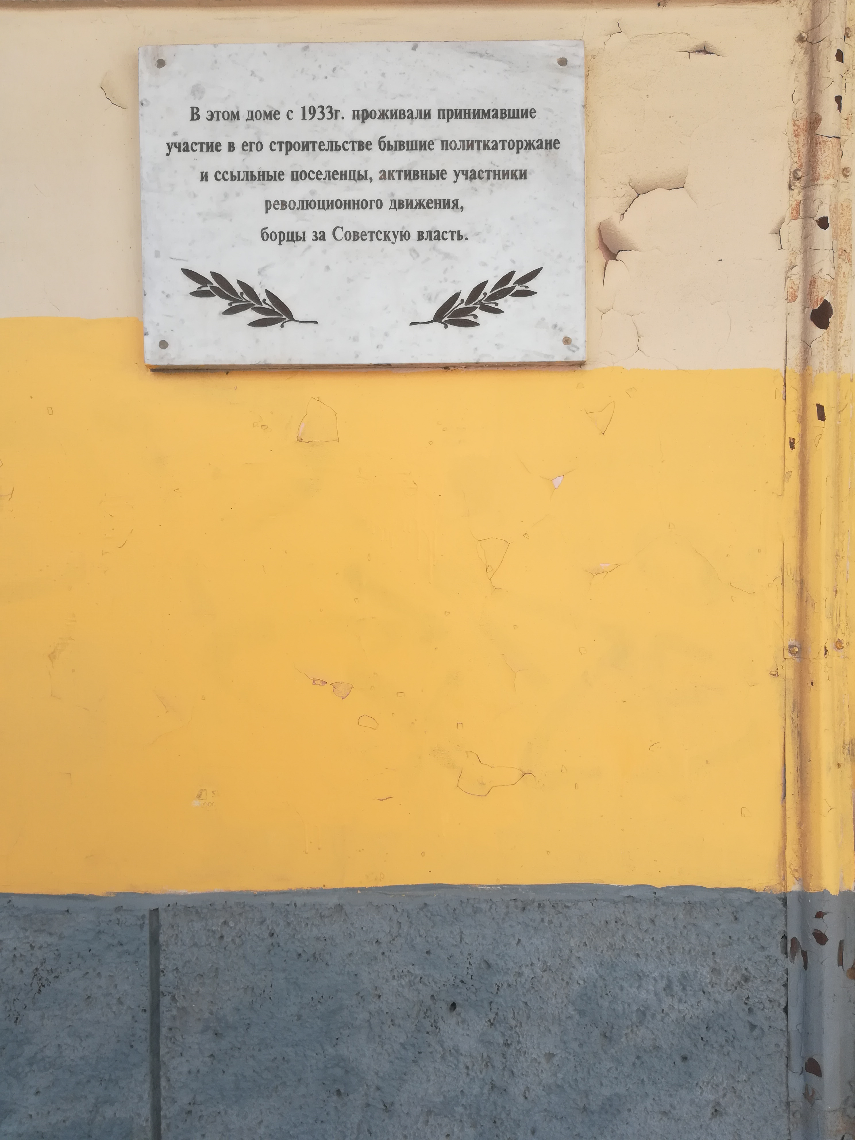 Новосибирск